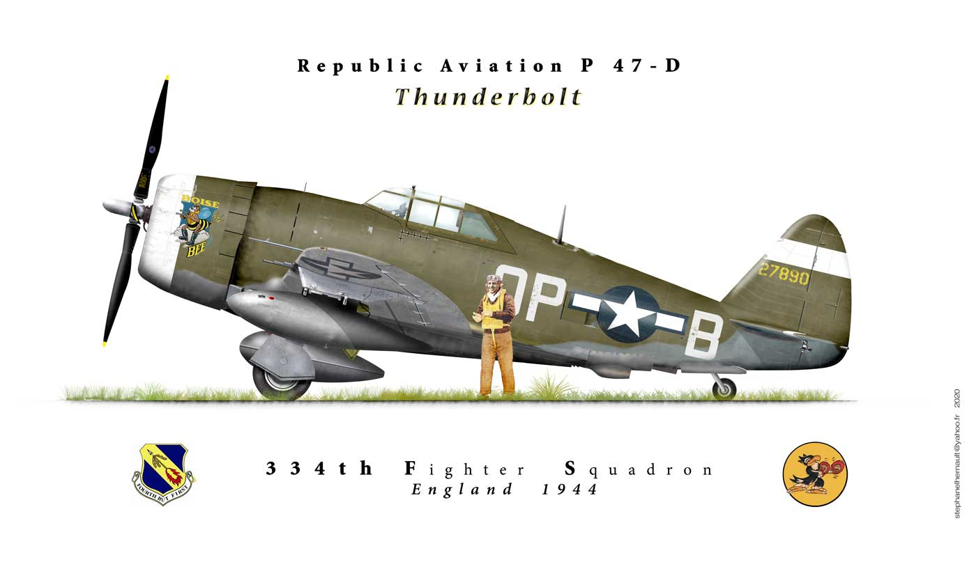 dessin profil P47D 334th Fighter squadron 1944